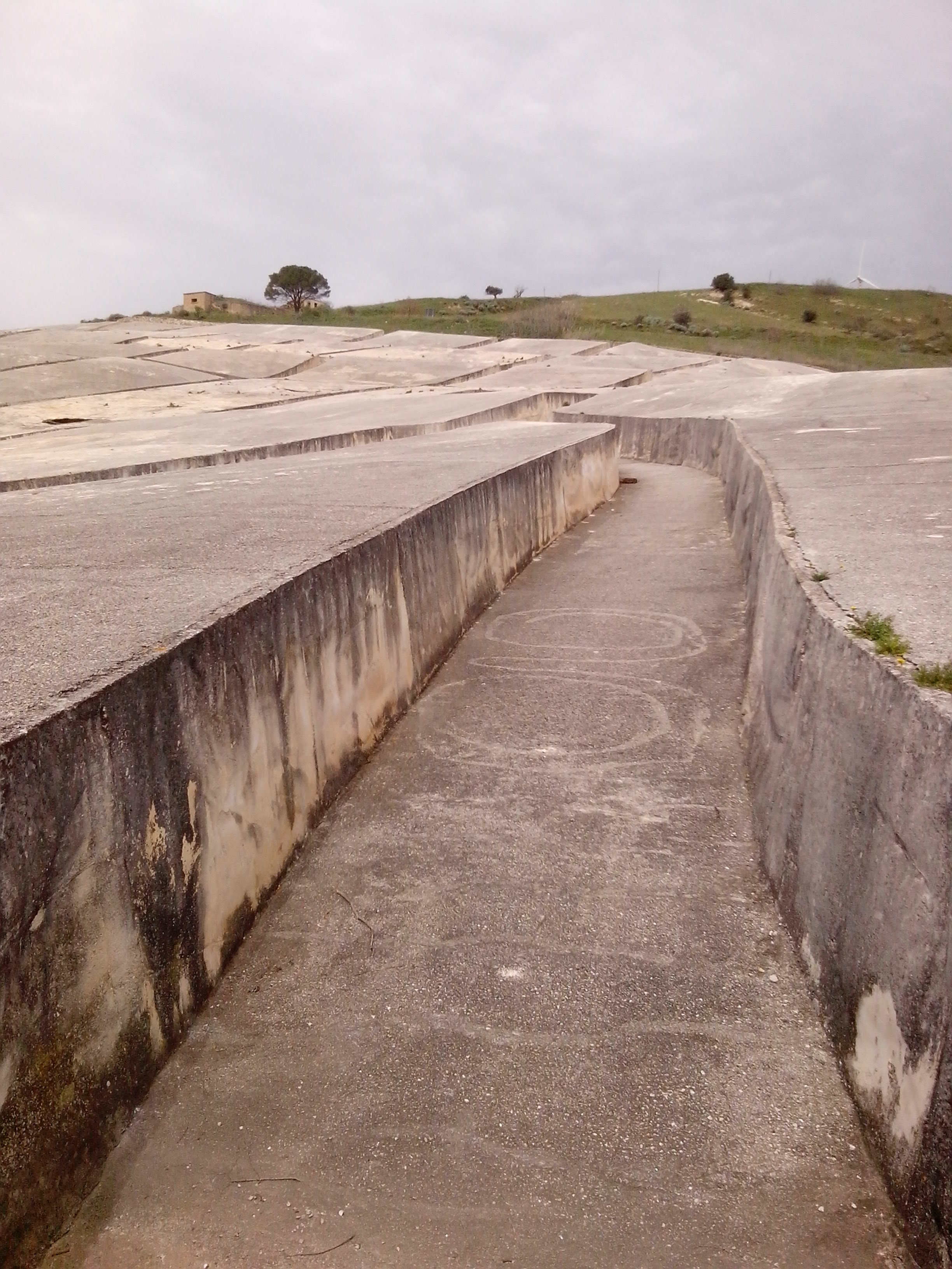 Cretto di Burri (particolare), Gibellina